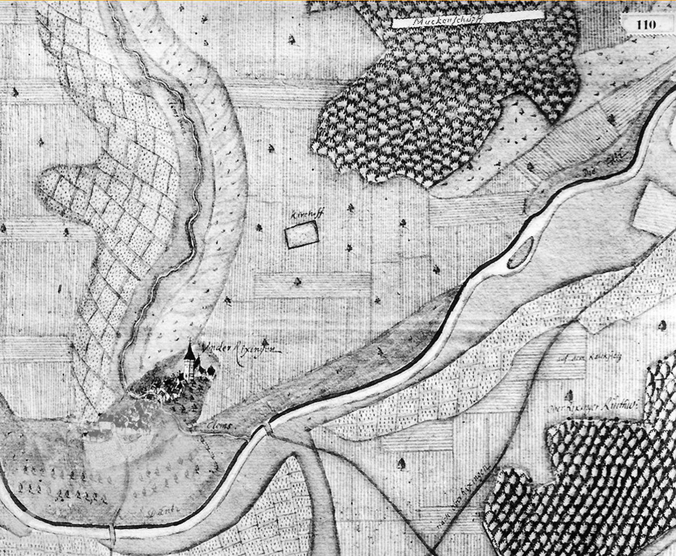 Der Muckenschupf auf einem Ausschnitt der Kieserschen Forstkarte Nr. 110 von 1684.Originaltitel des Landesmedienzentrums: „Under-Rixingen (Unterriexingen)“ (Nr. 110).